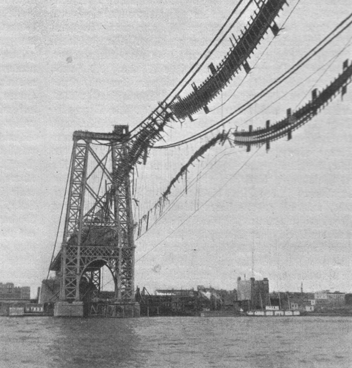 Die am 11. November 1902 während des Baus durch ein Feuer beschädigte Williamsburg Bridge in New York City.